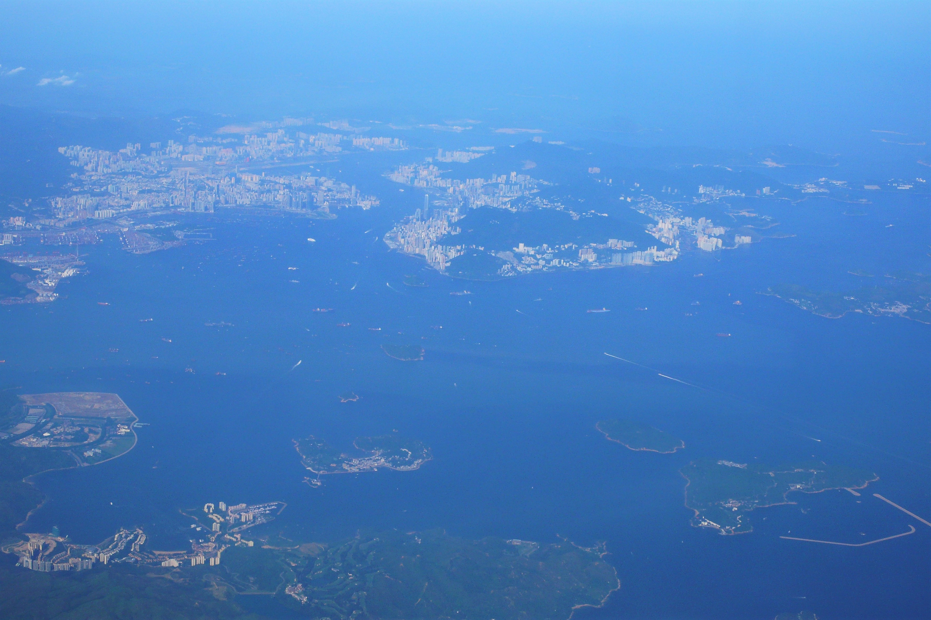 Hong Kong overview